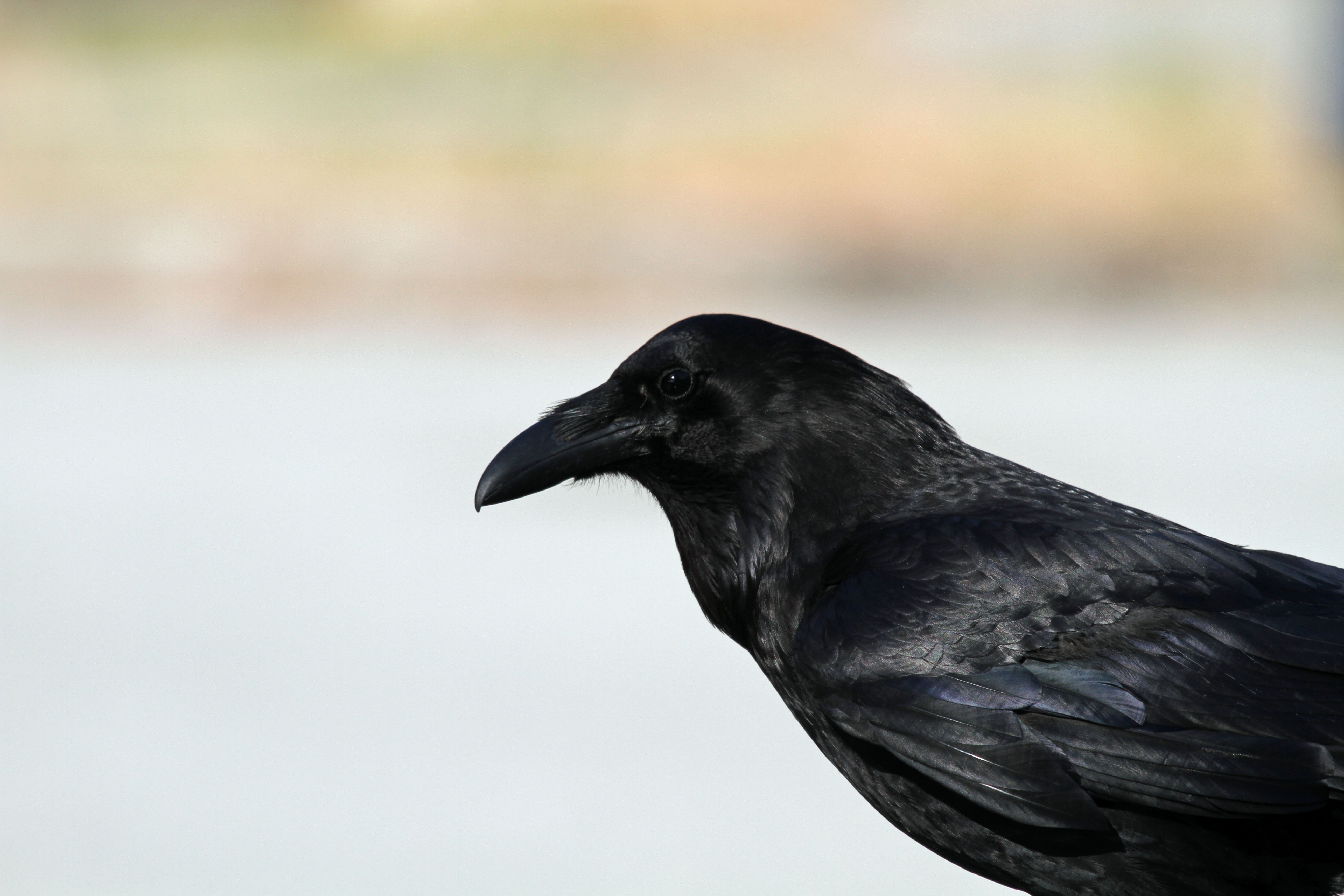 Raven